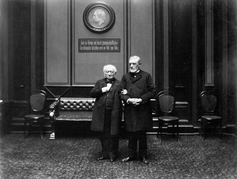 Mitglieder des Deutschen Reichstages Dr. Windthorst . Dr. Miquél [Unter der Medaillon Fichte mit Inschrift "Auch im Kriege und durch gemeinschaftliches Durchkämpfen desselben wird ein Volk zum Volke." Aufnahme aus Fotoalbum der "Deutsche Reichstag und sein Heim"] Abgebildete Personen: Windthorst, Ludwig Dr.: Justizminister des Königreichs Hannover, Reichstagsabgeordneter (MdR), Rechtsberater und Bevollmächtigter König Georgs V., Deutschland (GND 118633678) Miquel, Johannes von: MdR, Finanzminister von Preußen, Nationalliberale Partei, Deutschland (GND 11873413X)